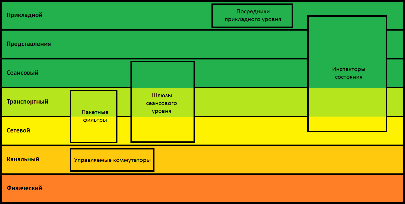 Классификация межсетевых экранов на основе модели OSI